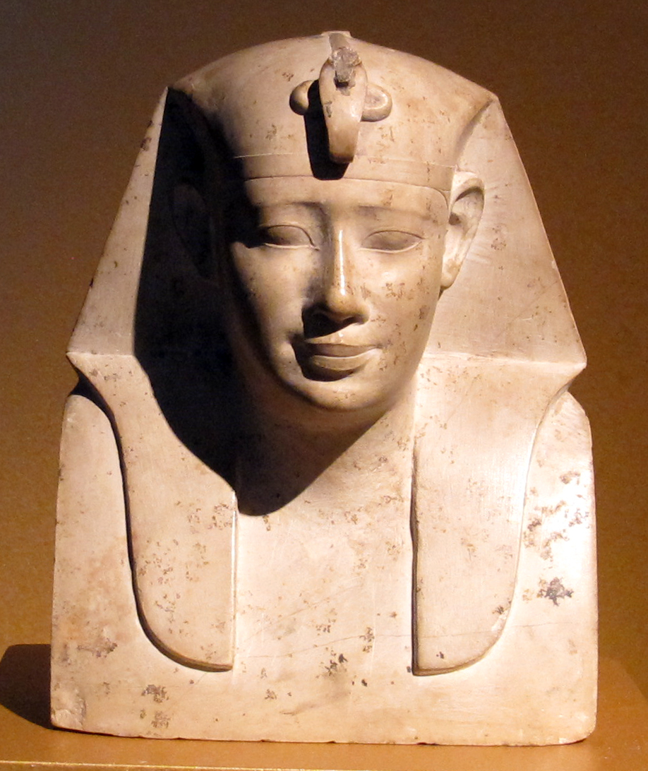 Egyptian antiquities in the Brooklyn Museum